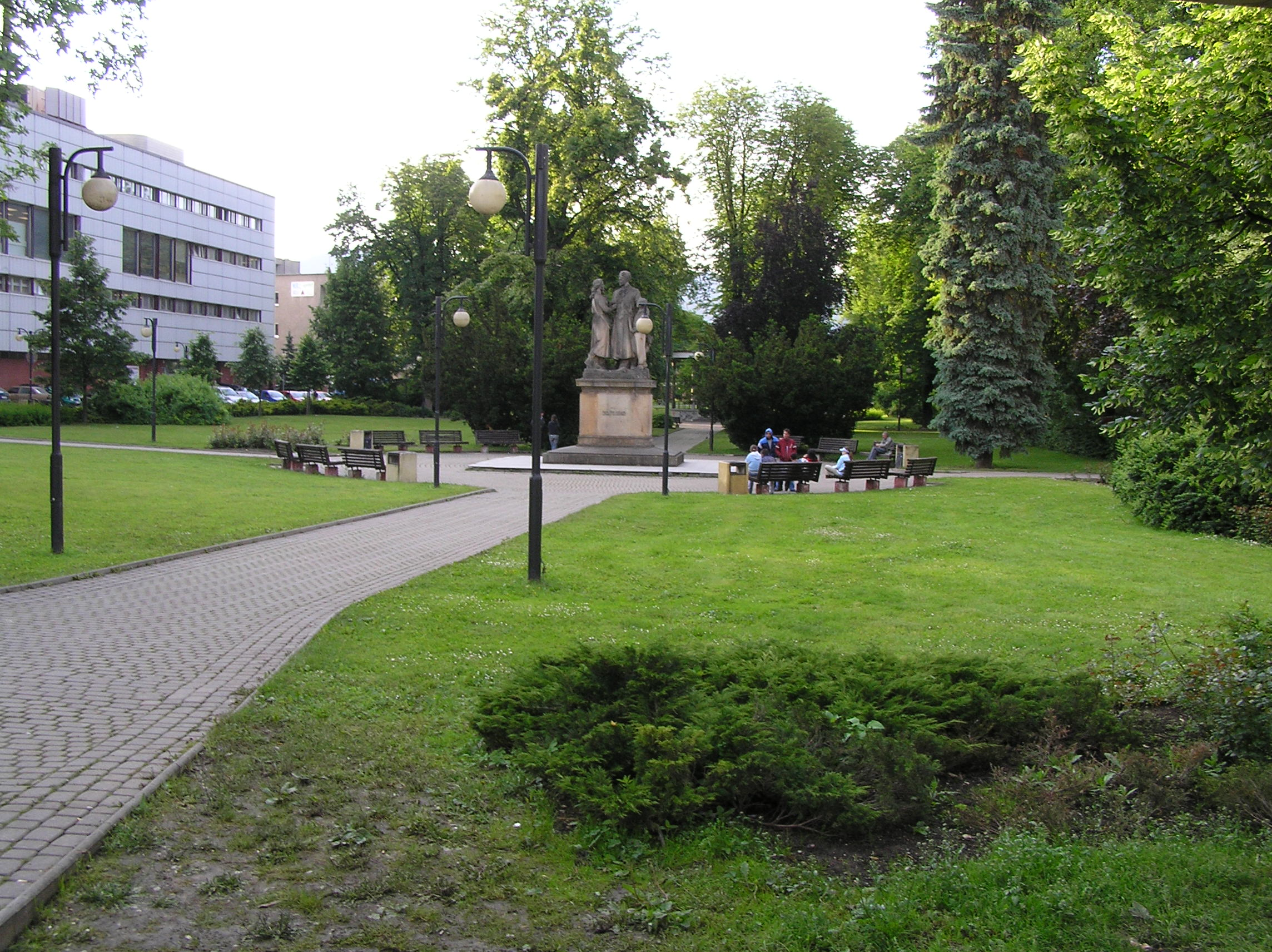 Pamätník obetiam vojny Námestie Andreja Hlinku, Žilina sochár Rudolf Pribiš (19.3.1913 - 3.7.1984), odhalené v r. 1955 10. výročí vstupu 1. čsl. armádneho zboru do mesta